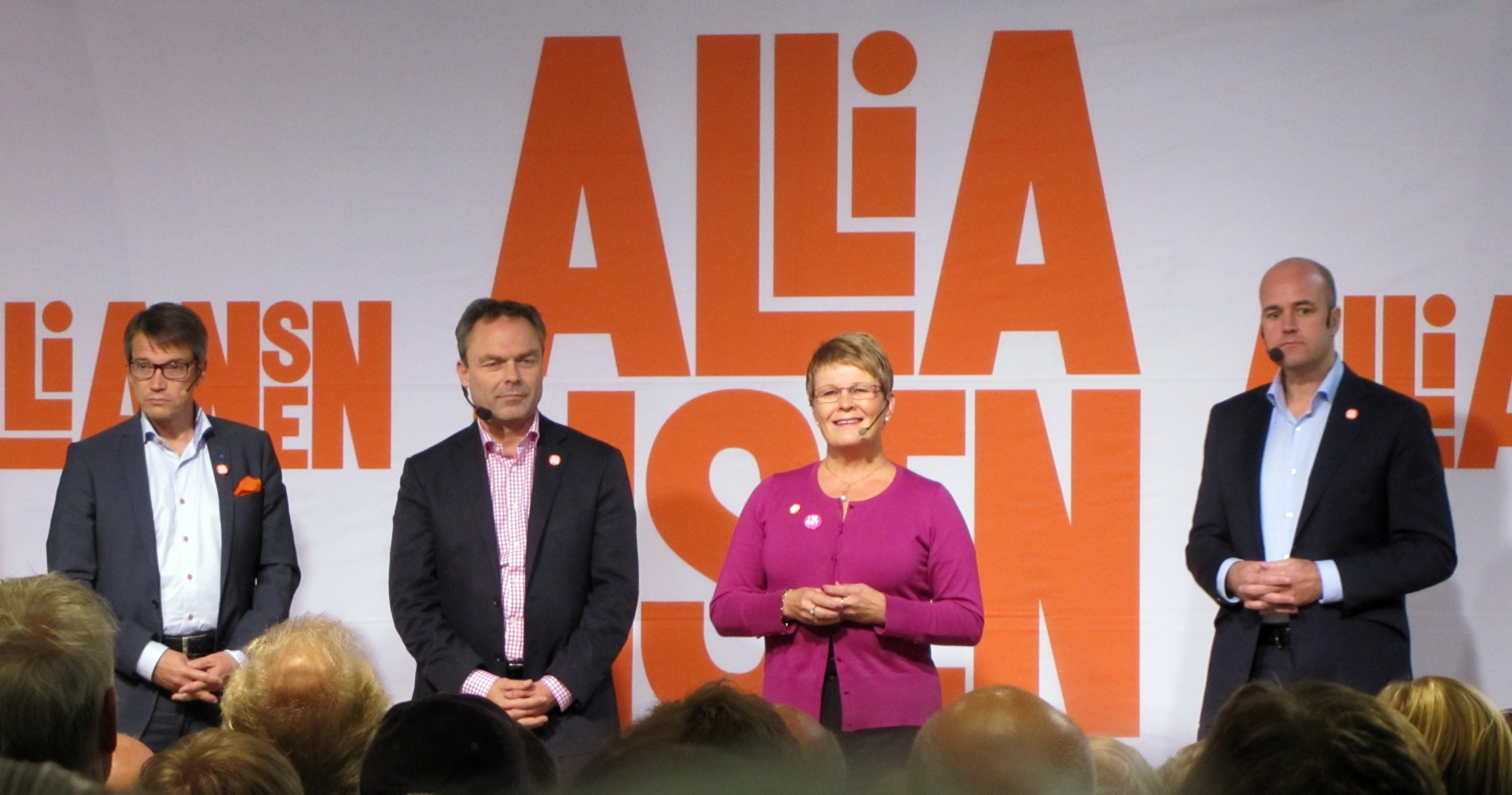 Alliansens partiledare vid ett valmöte i Nordstan, Göteborg, dan innan riksdagsvalet.